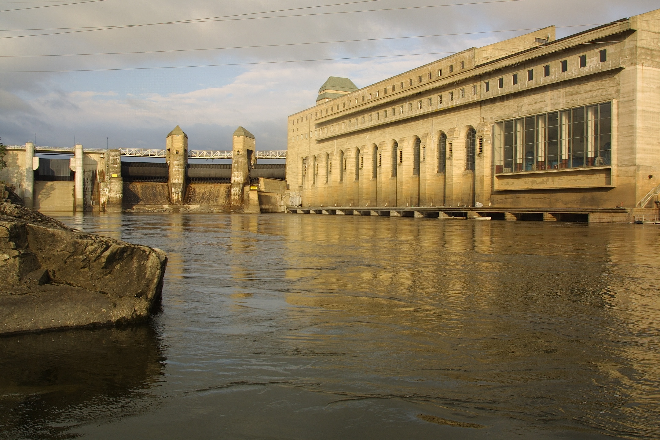 Solberg